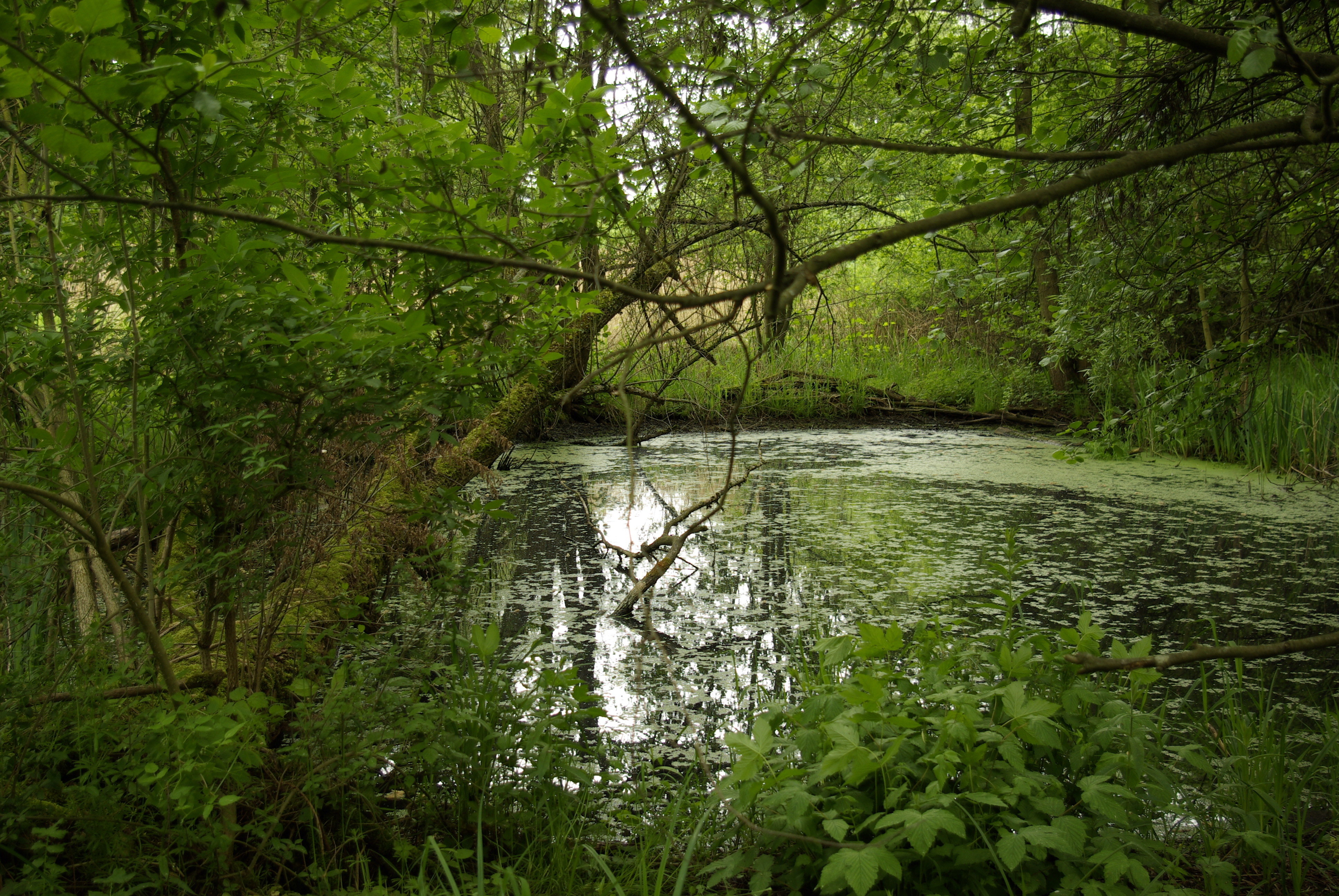 Fürther Stadtteil Mannhof: Bucher Landgraben im Langwald, Teil des Landschaftsschutzgebietes Waldgebiet Mannhof.